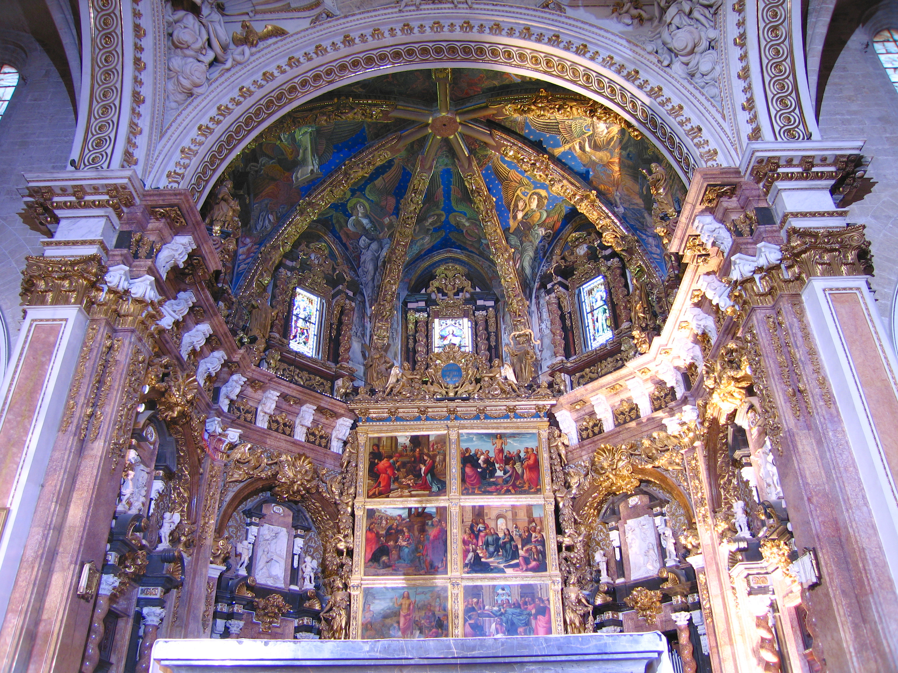 Vista interior del presbiteri de la seu de València